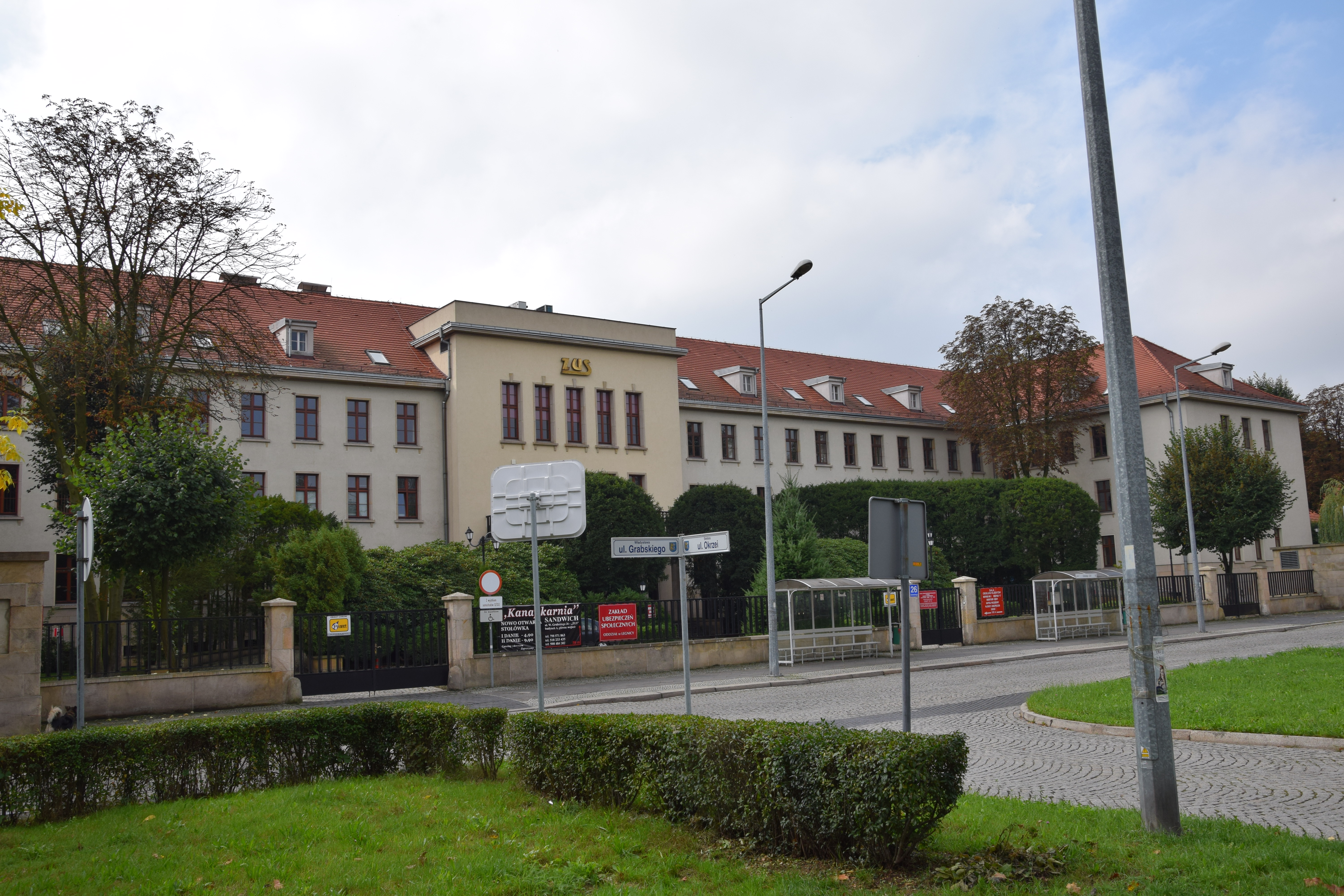 Legnica, komendantura garnizonu Wermachtu, ob. ZUS, 1937